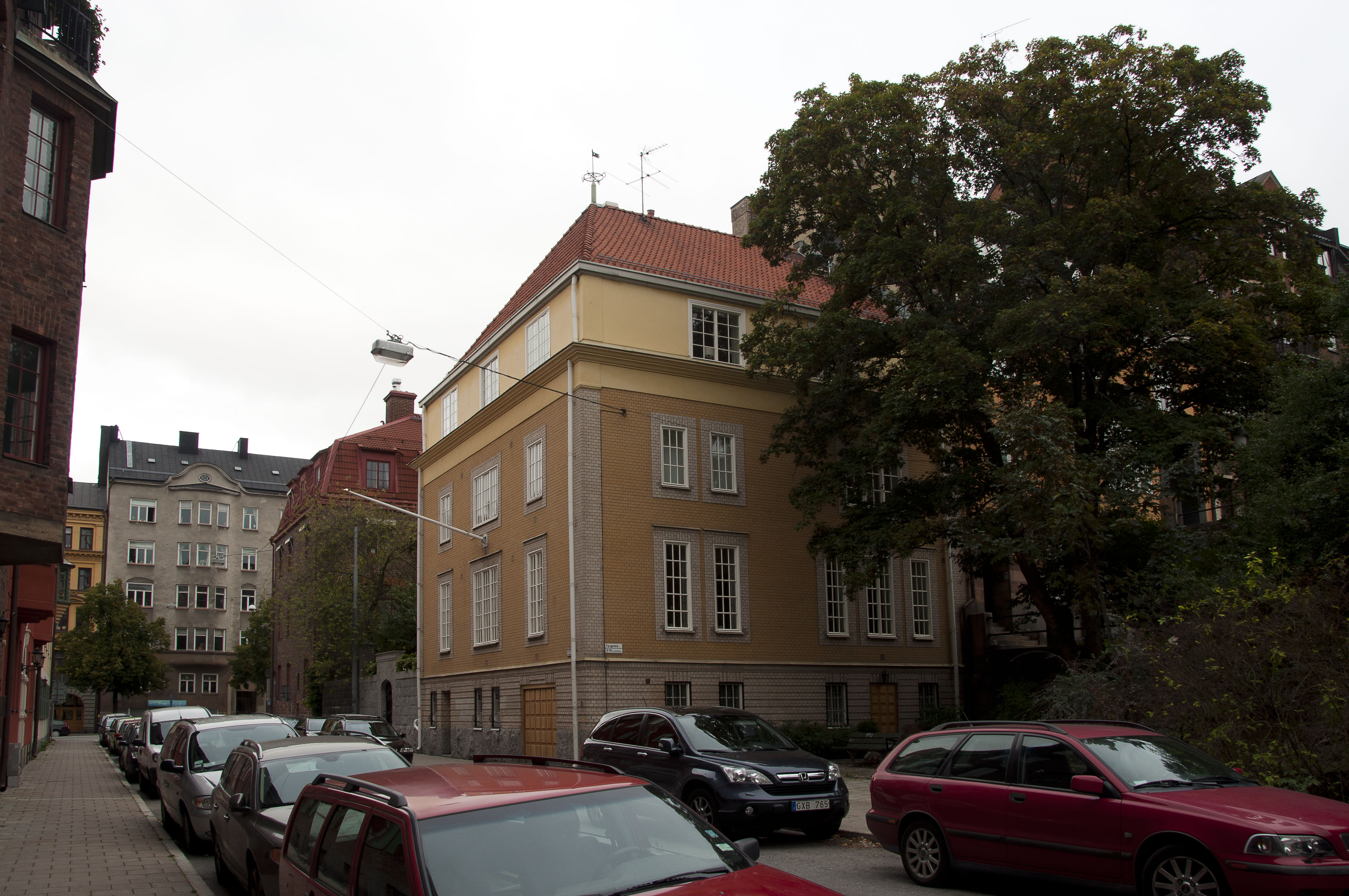 Verdandigatan 2: Byggnadsår 1911-13, arkitekt I G Ekedahl (fasad) och I Engström, byggherre W Blomberg, byggmästare I Eng- ström. Påbyggnad med en våning 1917, ark J Norborg F.d. Östtyskaambassaden.